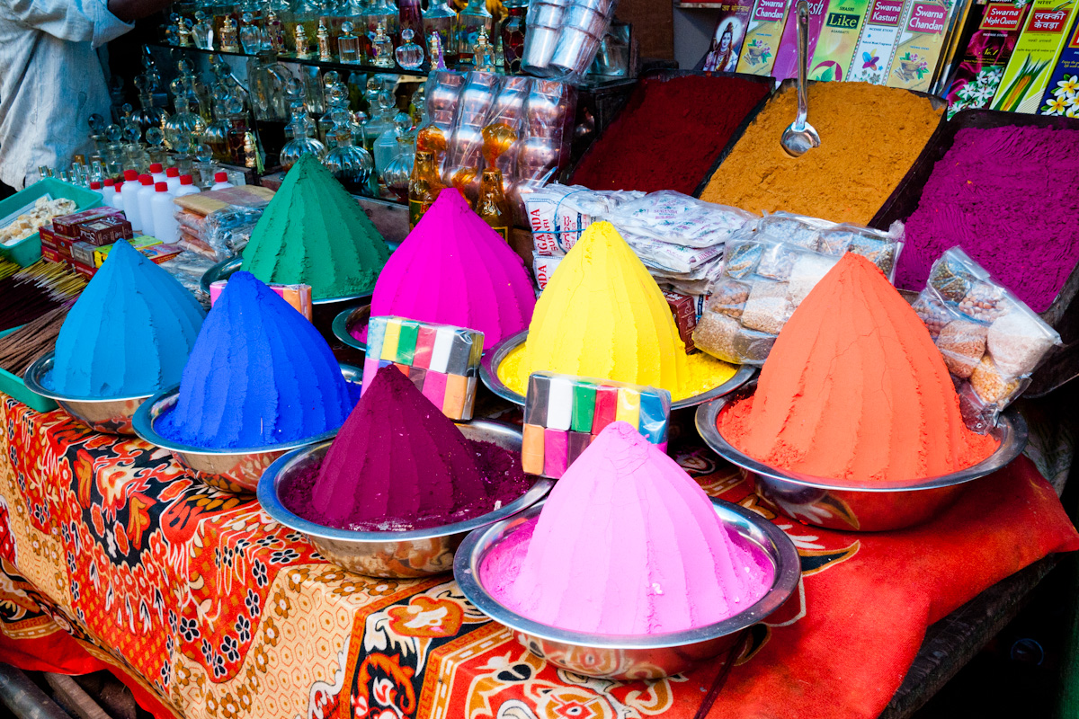 Pigments at Devaraja Market in Mysore